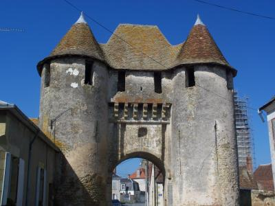 Porte de Champagne